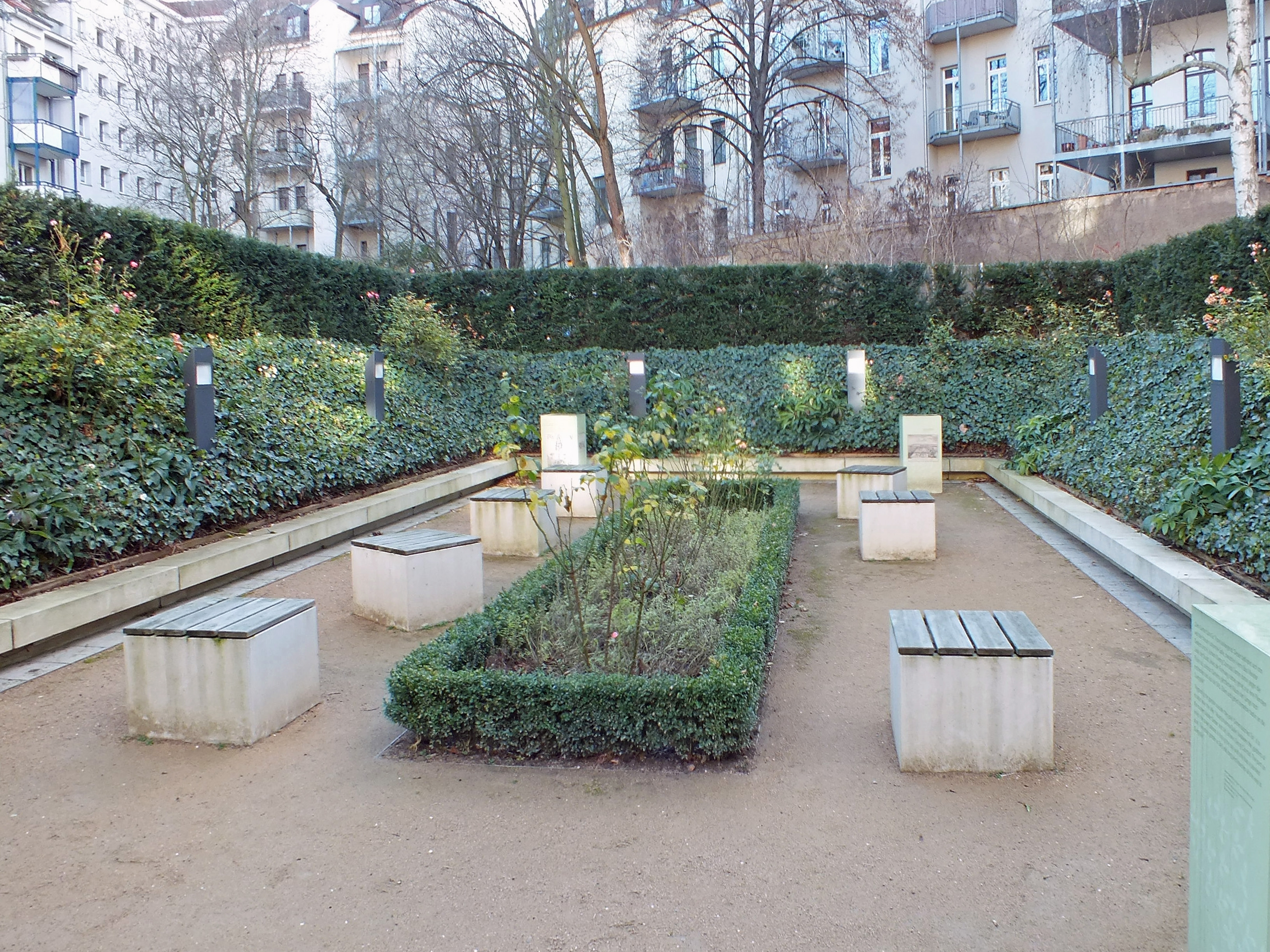 Der Garten hinter dem Bosehaus in Leipzig